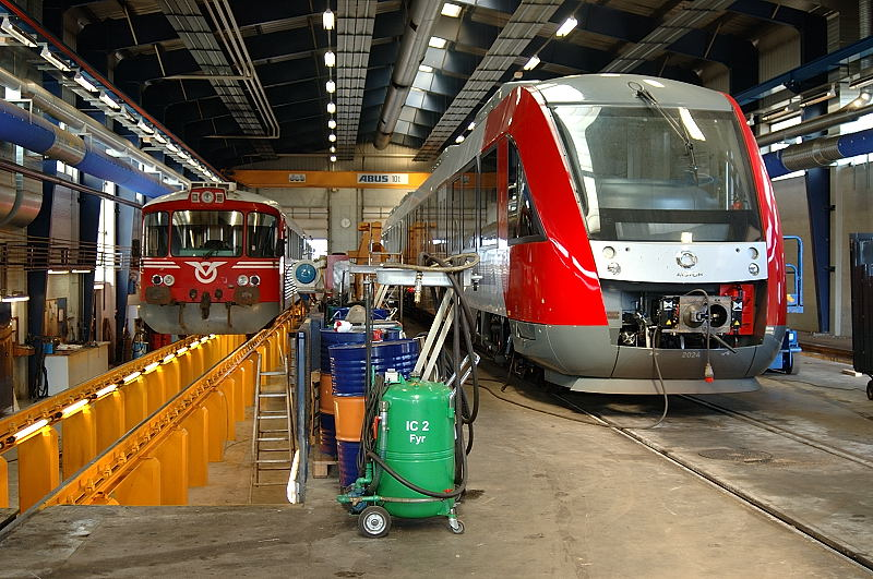 Vestsjællands Lokalbaner Lynette and Lint DMUs in the workshop in Holbæk